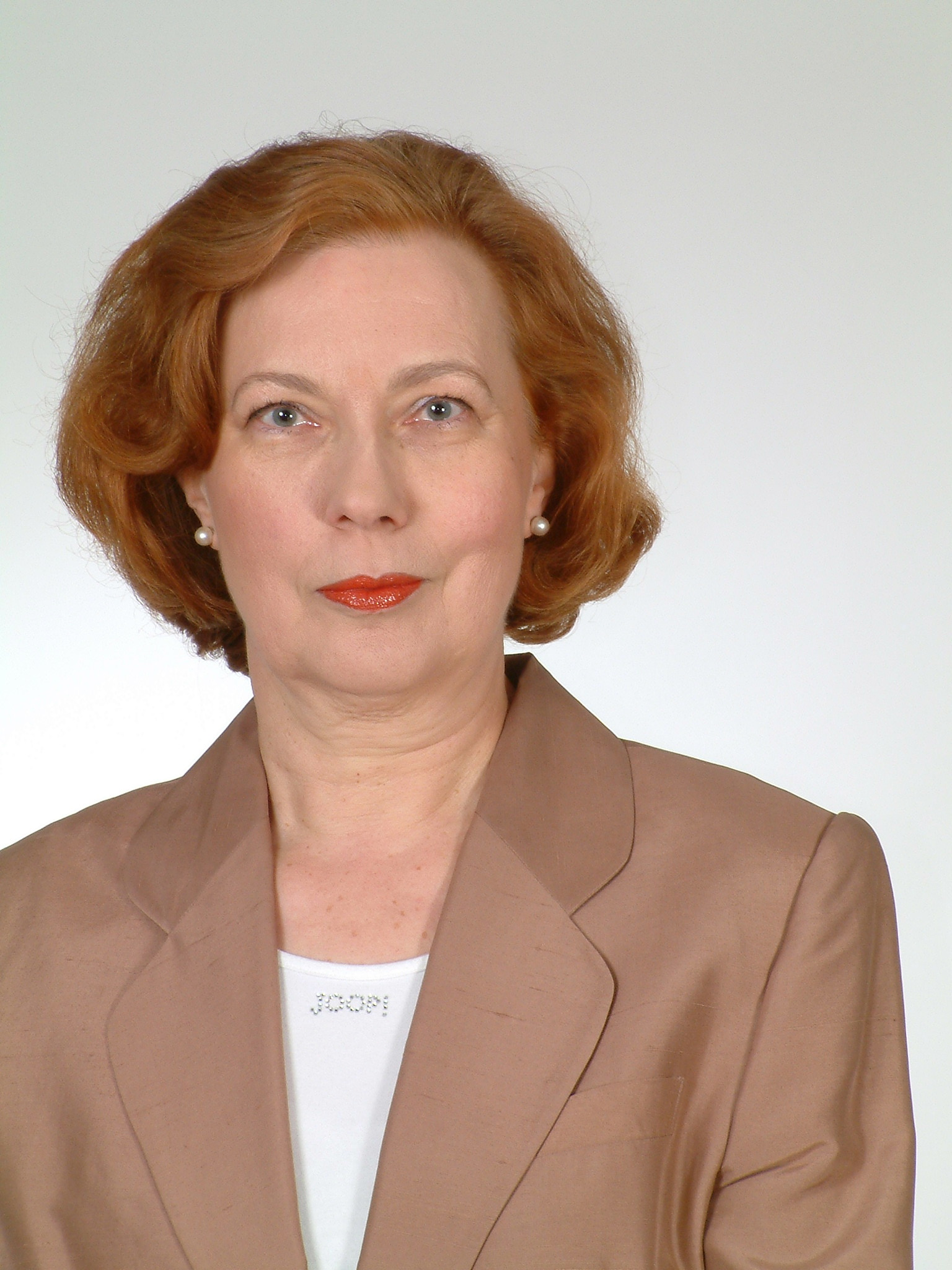 Portrait Inez De Florio-Hansen